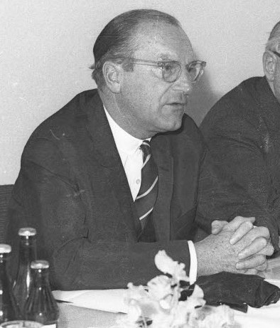 Stapellauf bei den Howaldtswerken für die Reederei John T. Essberger. Im Bild die Pressekonferenz im Hotel Conti-Hansa mit HDW-Werftdirektor Arno Klehn (1.v.r.), Mitinhaber der Reederei John T. Essberger Prof. Dr. Rolf Städter (2.v.r.) und dem Direktor der Benzin und Petroleum AG (BP), Hans Joachim Burchard (3.v.r.).